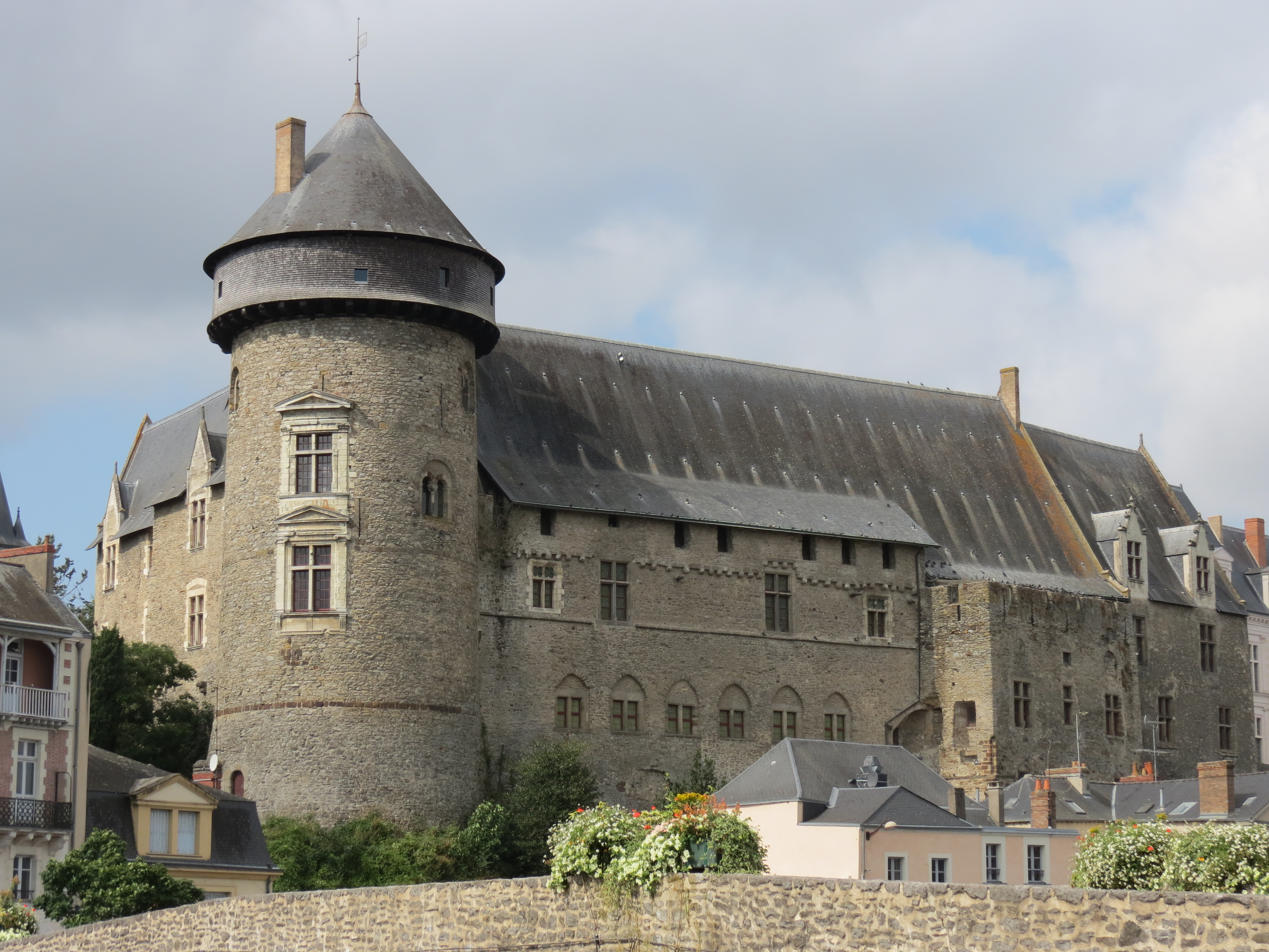 Château, Laval, Mayenne, Pays de la Loire.